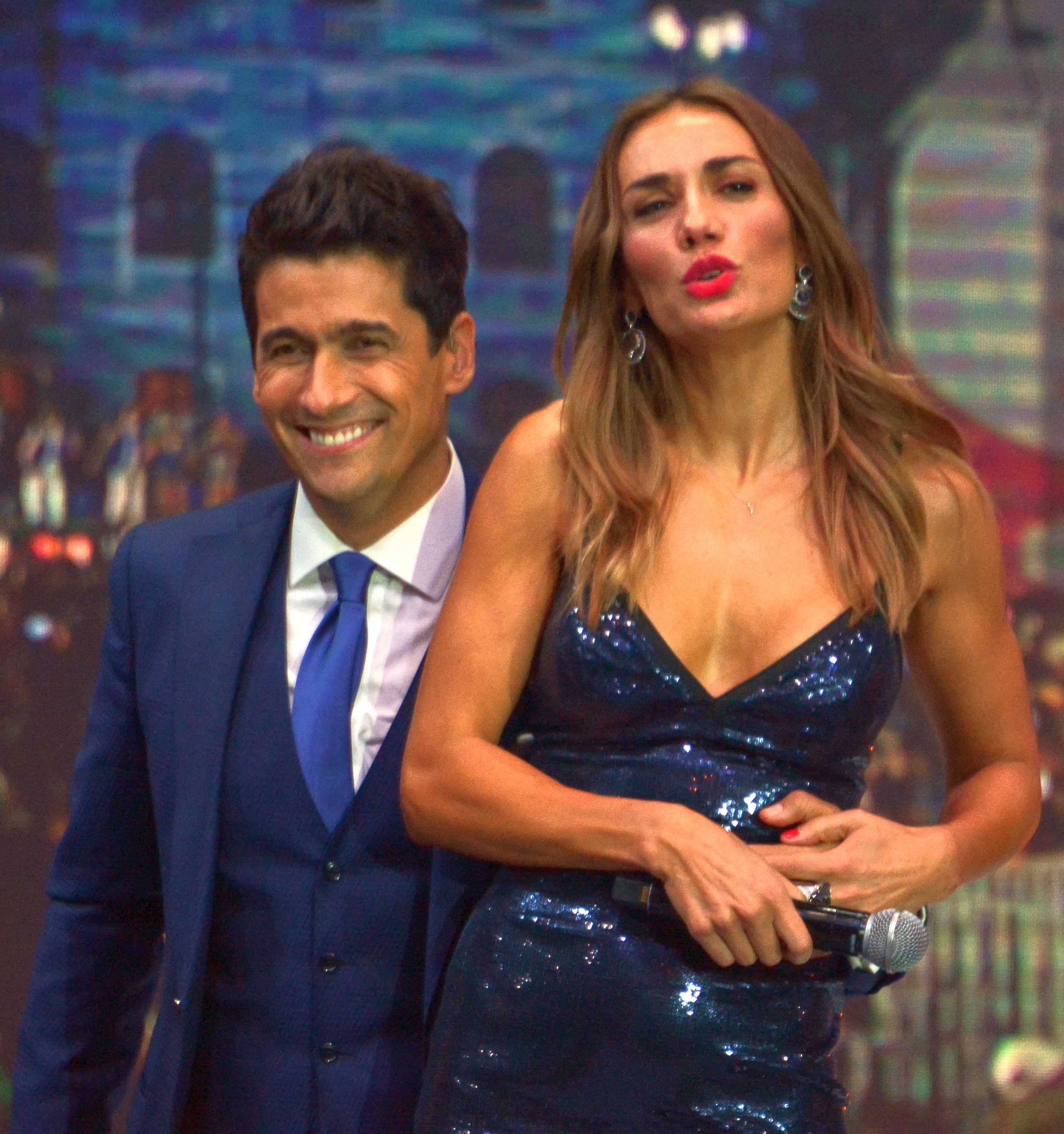 Teletón 2017